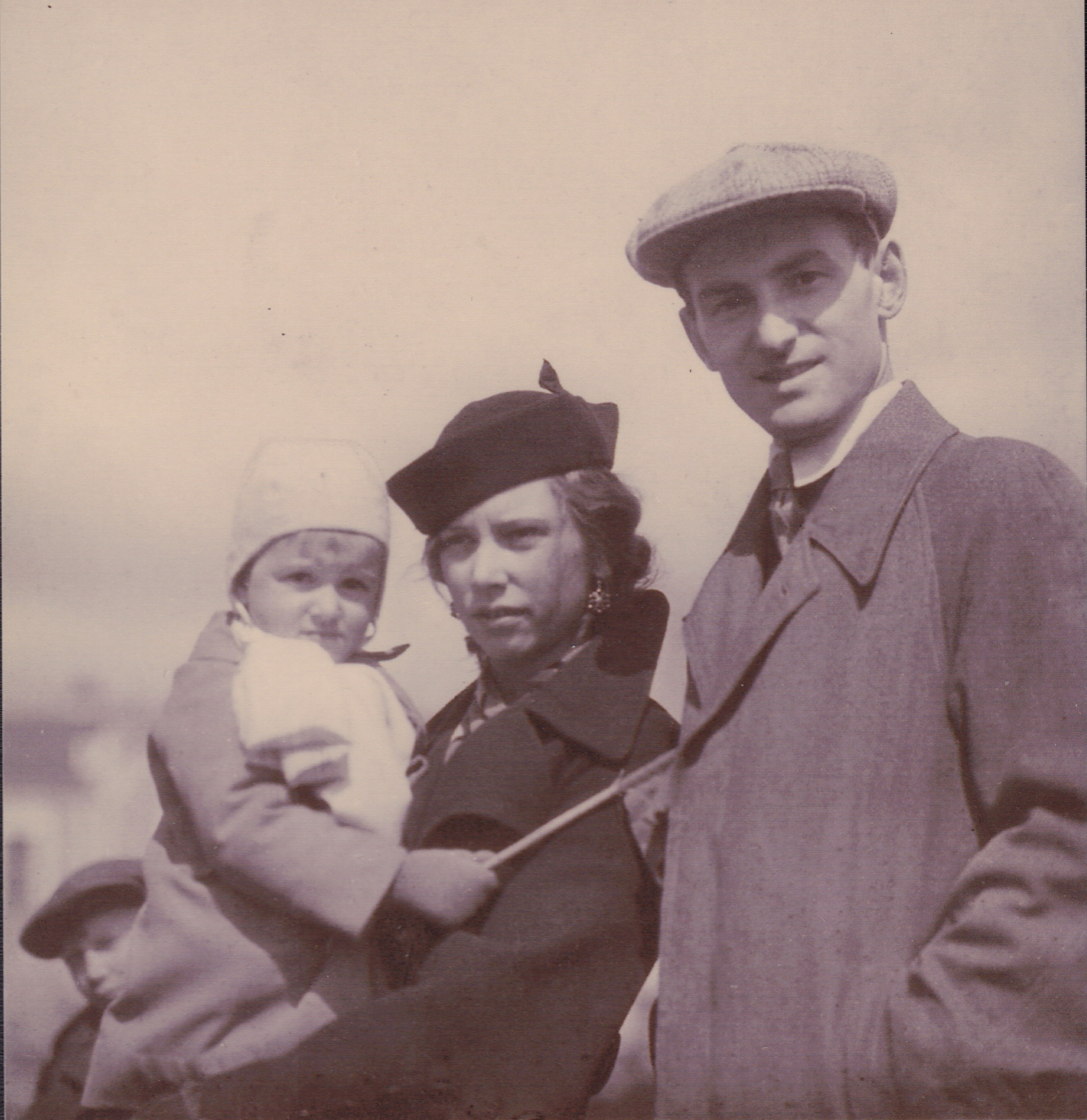 Архитектор Алексей Маркович Дукельский, его жена Ксения Юрьевна Стравинская и их дочь Елена. 1 мая 1936 г. Свердловск. Фото из архива Музея архитектуры и дизайна УрГАХУ, Екатеринбург